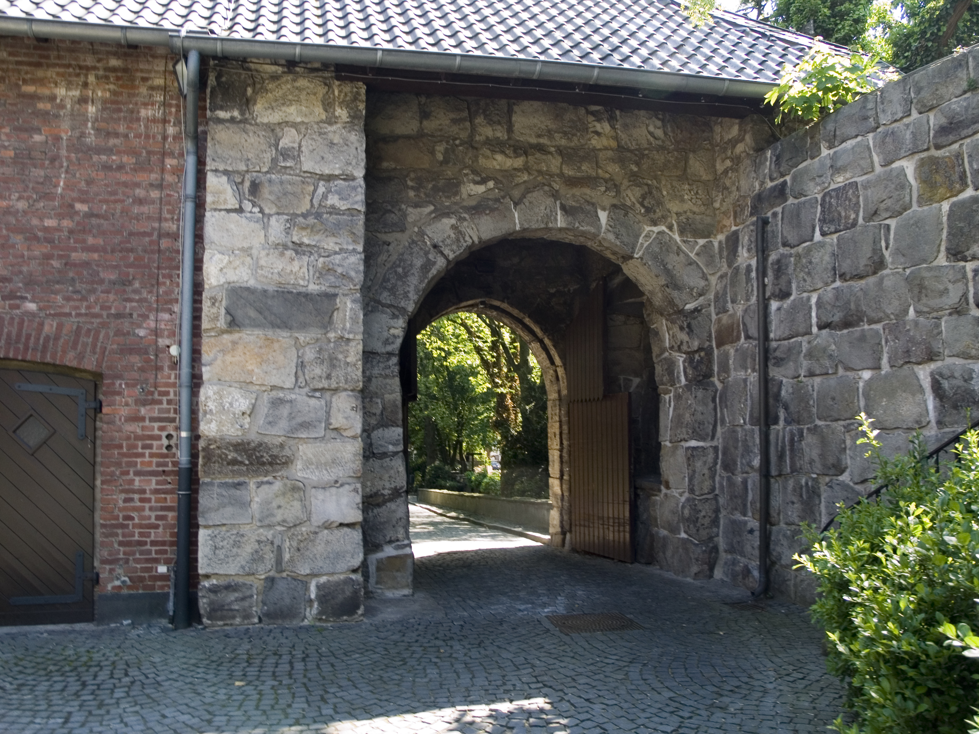 Северный Рейн-Вестфалия, Динслакен - Замок Динслакен (Ратуша)